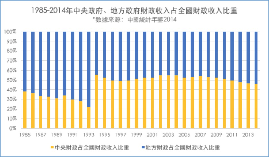 中文（中国大陆）: 1985-2014年中央政府、地方政府财政收入占全国财政收入比重繁体版